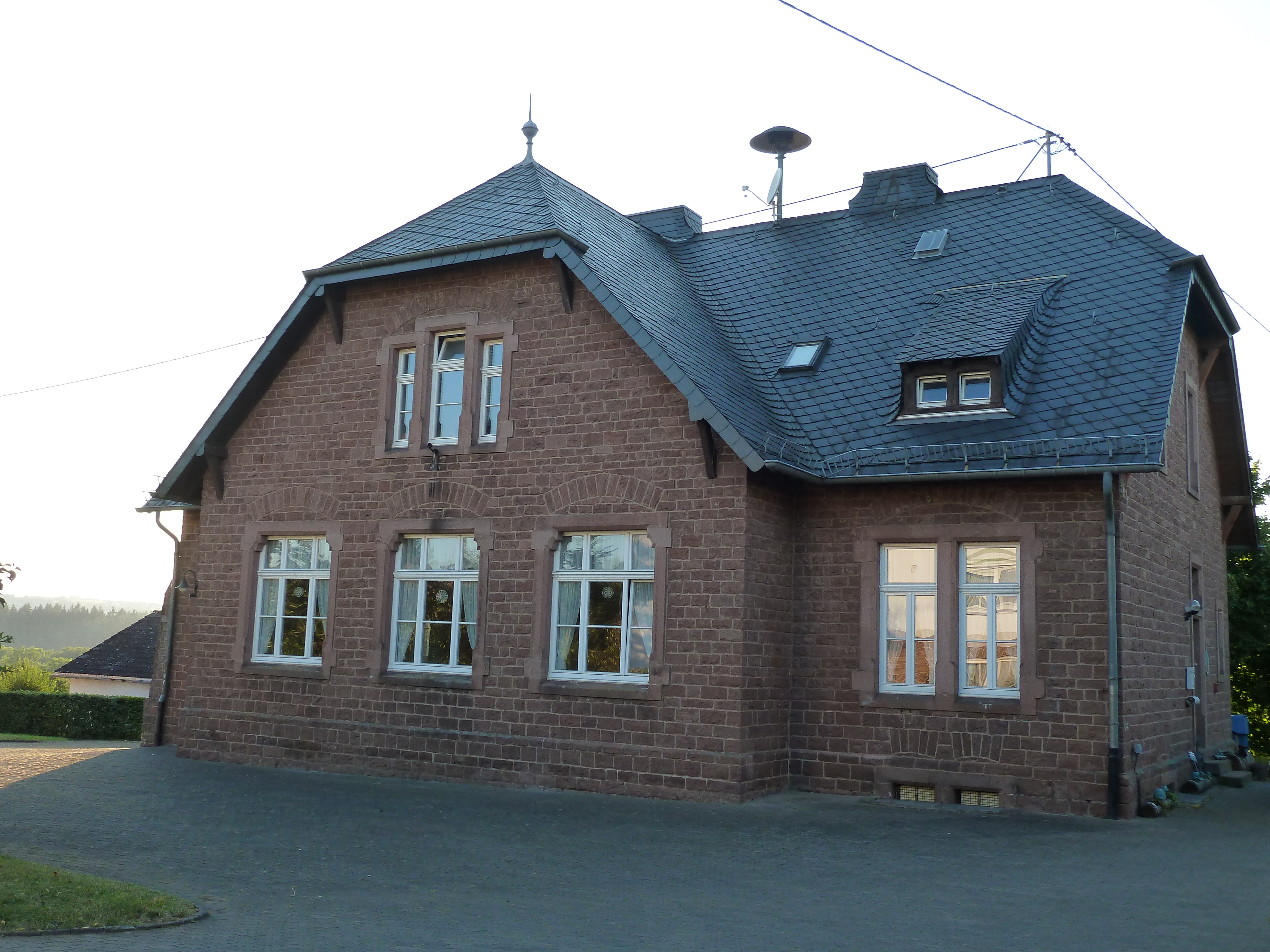 Bitburgerstraat 6 het huidige gemeentenhuis en voormalige schoolgebouw in Wilsecker